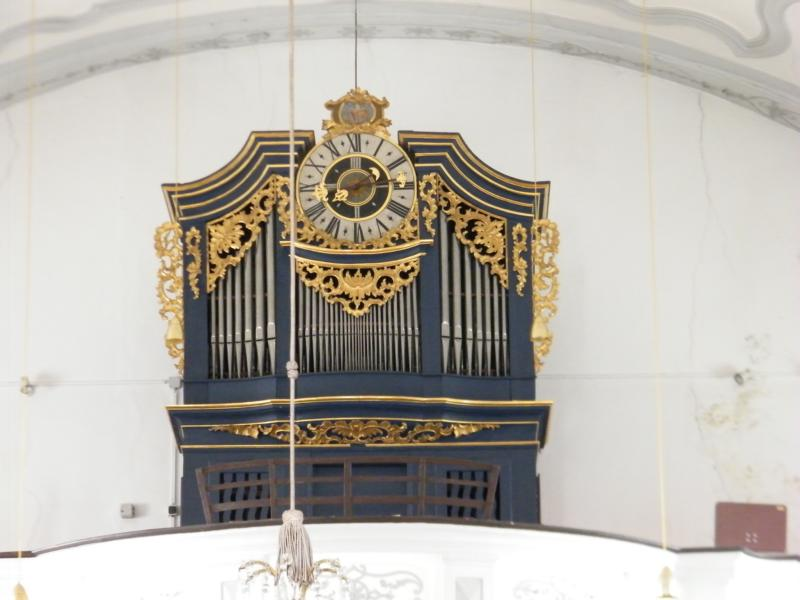 Arnsdorf Mitterreiter-Mooser-Orgel